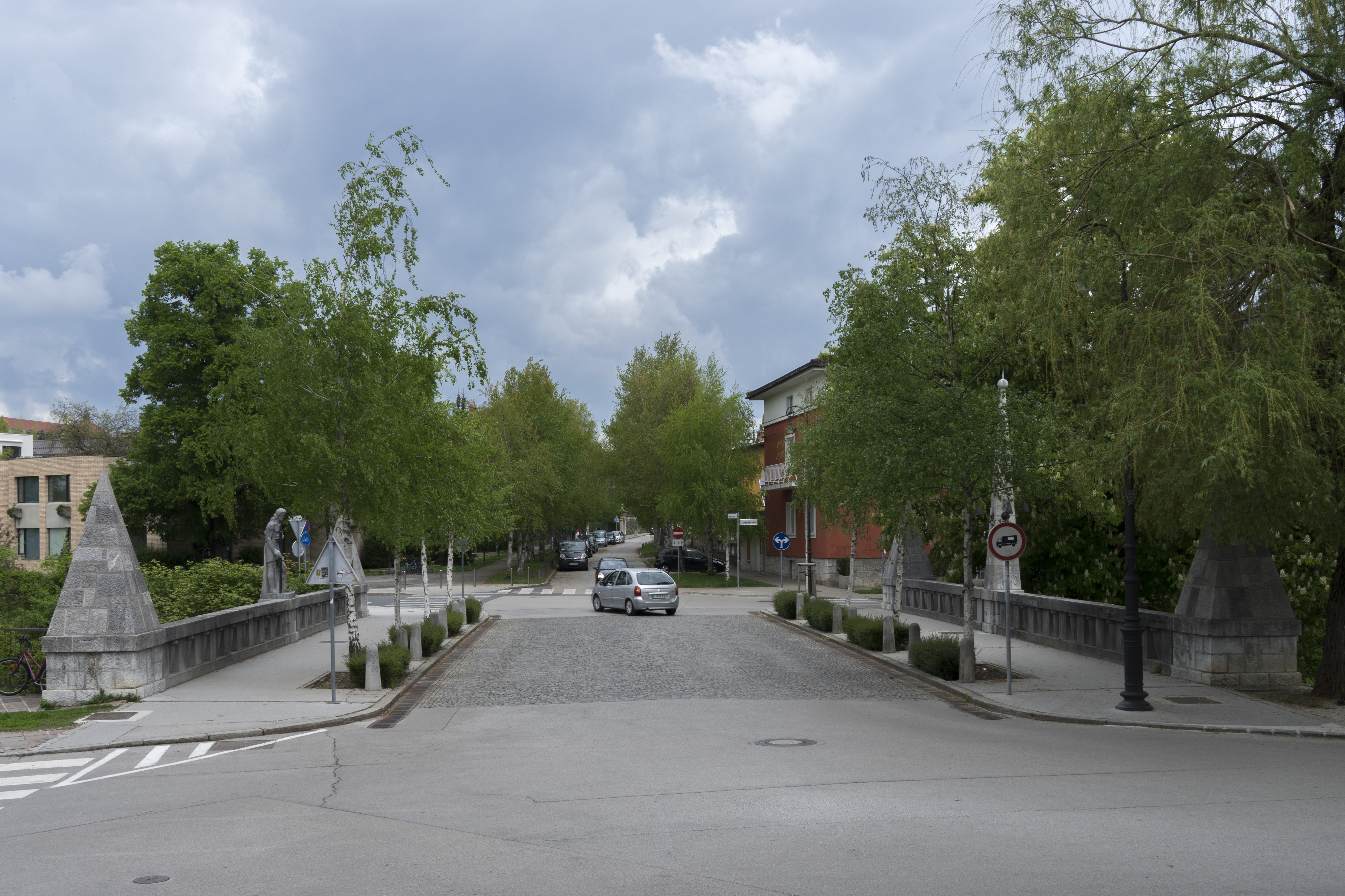 Brücke über die Trnovo